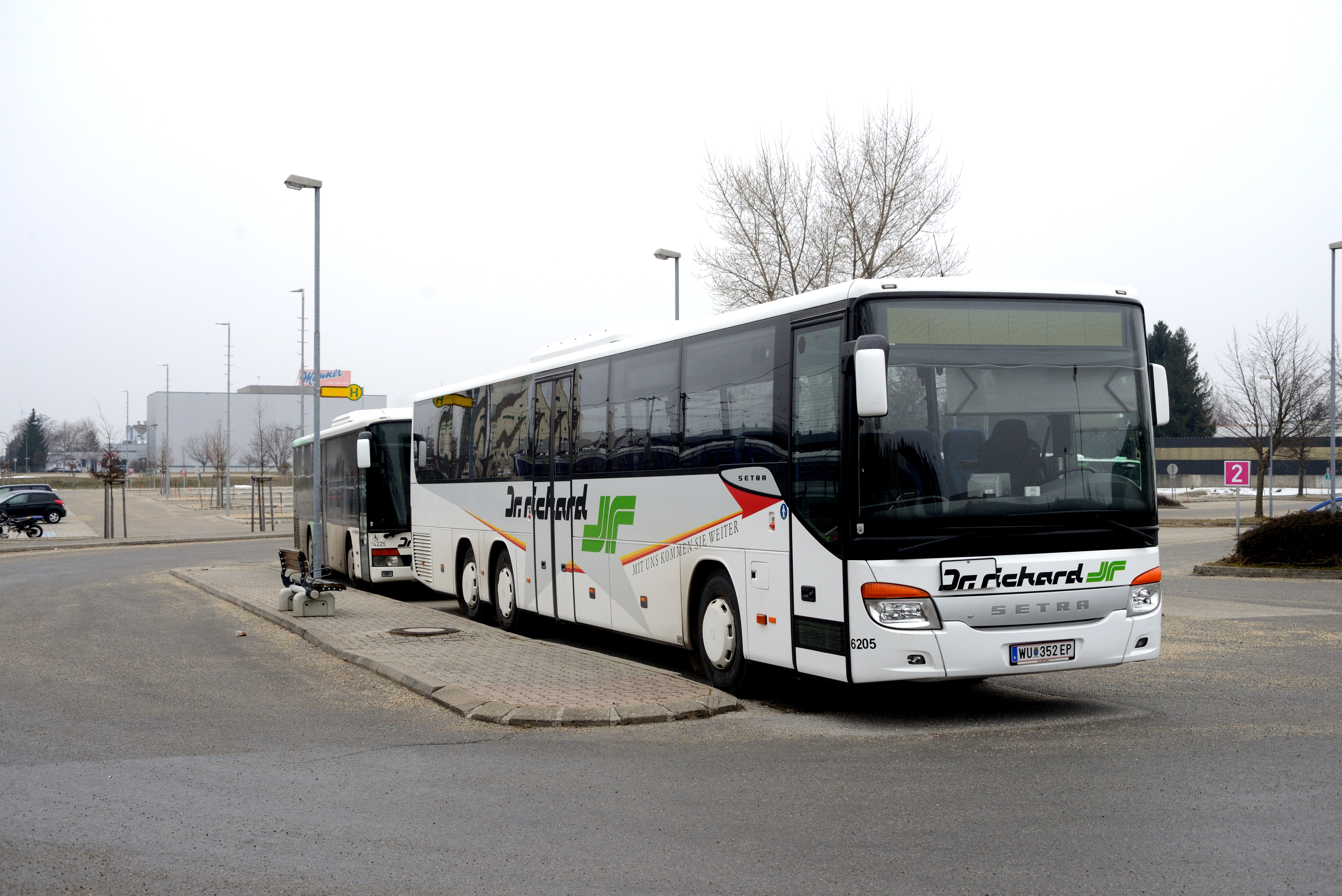 Setra S 417 UL, 6205 (Dr. Richard), beim Bahnhof Wolkersdorf.